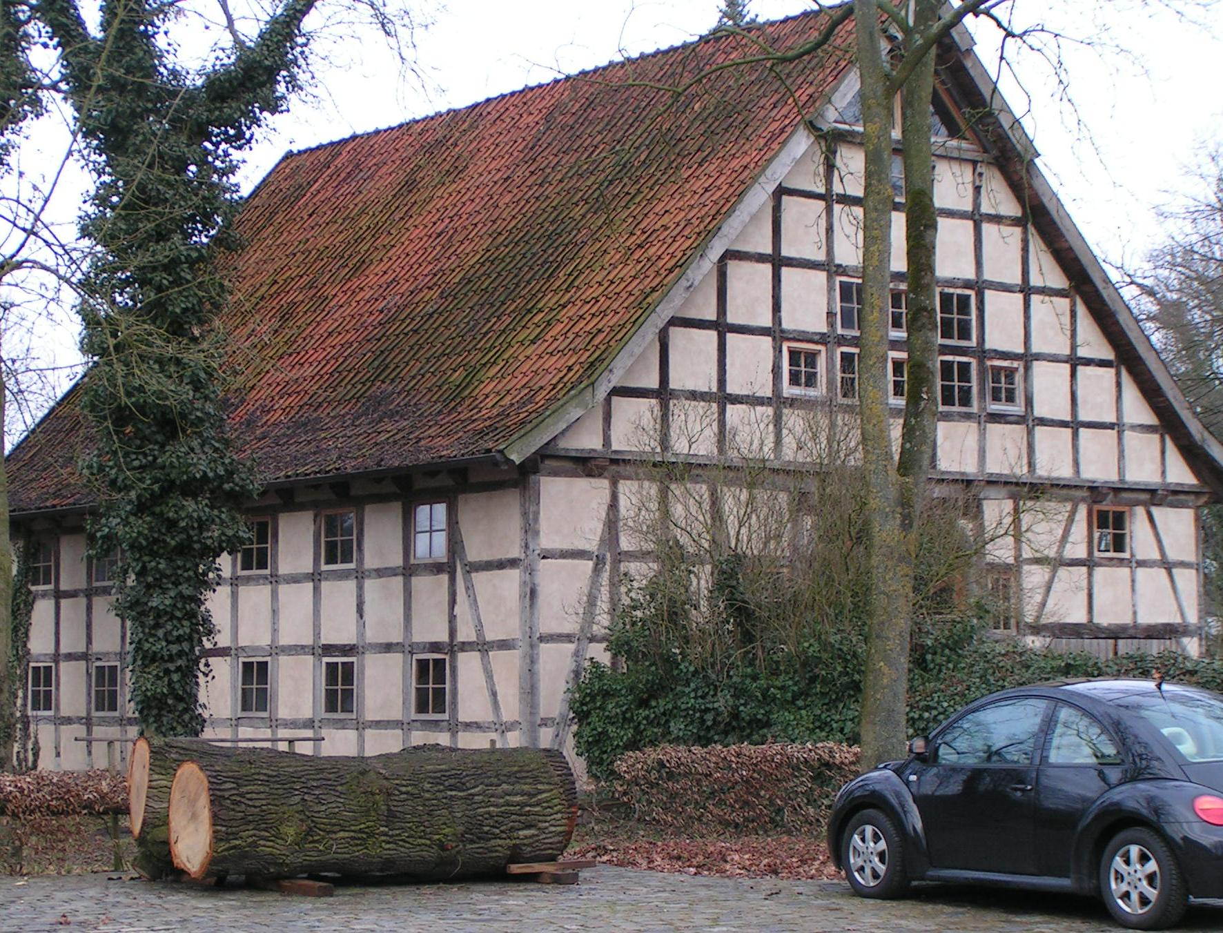 Kulturscheune (Veranstaltungsort) auf dem Gelände des ehemaligen Klosters Malgarten (Stadt Bramsche)